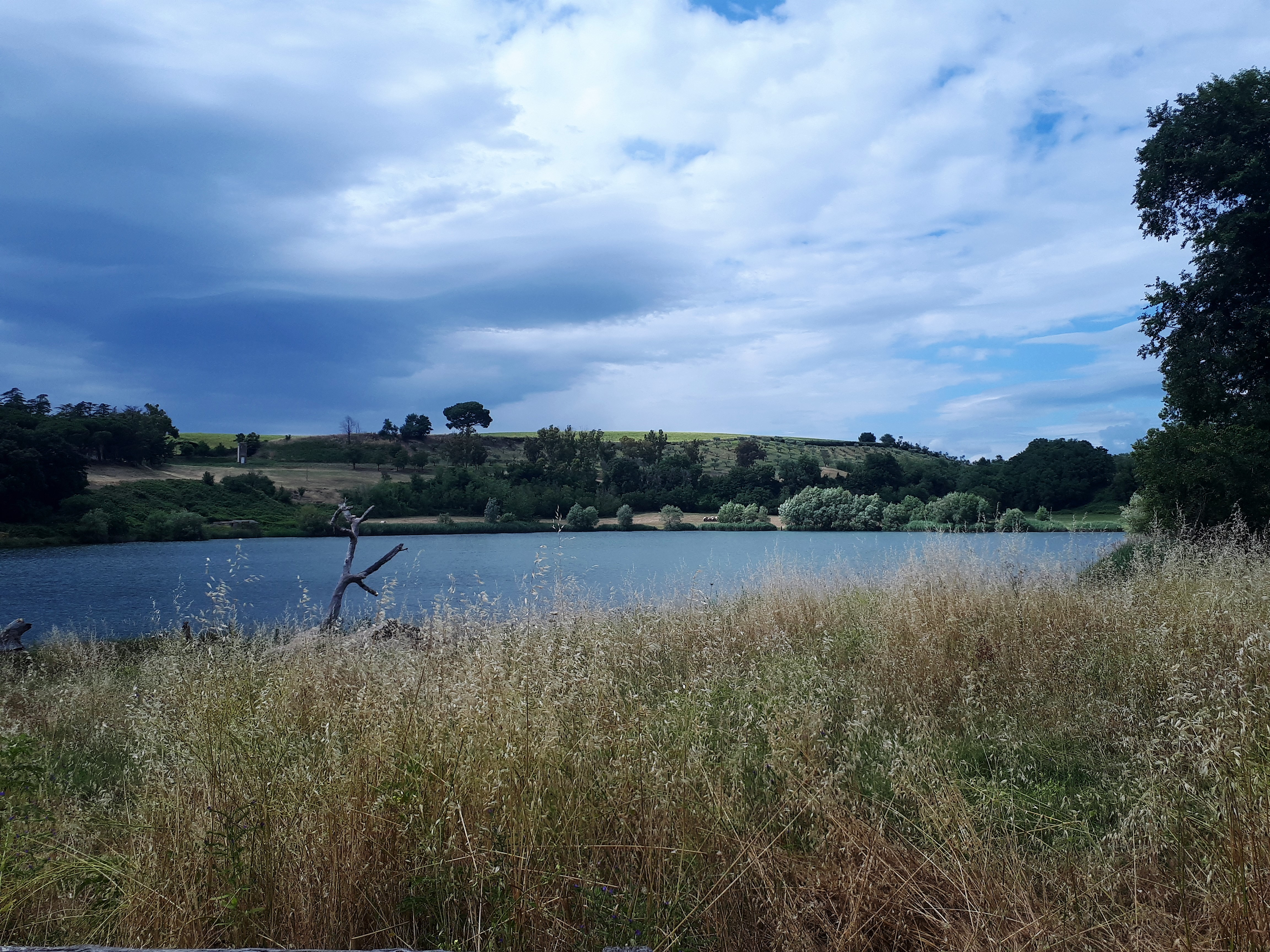 Lago di Giulianello, Artena, Lazio, Italia